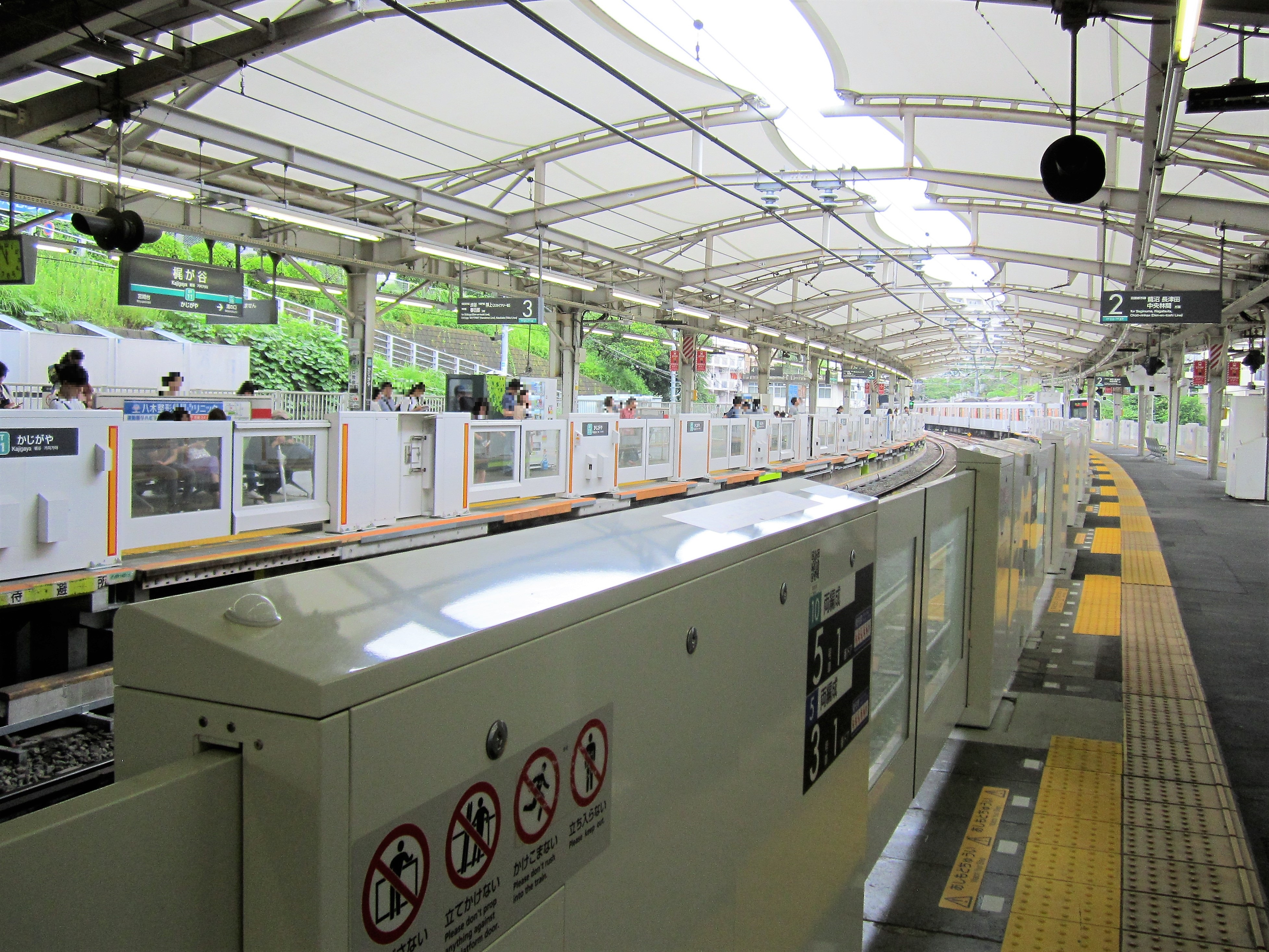 梶が谷駅ホーム